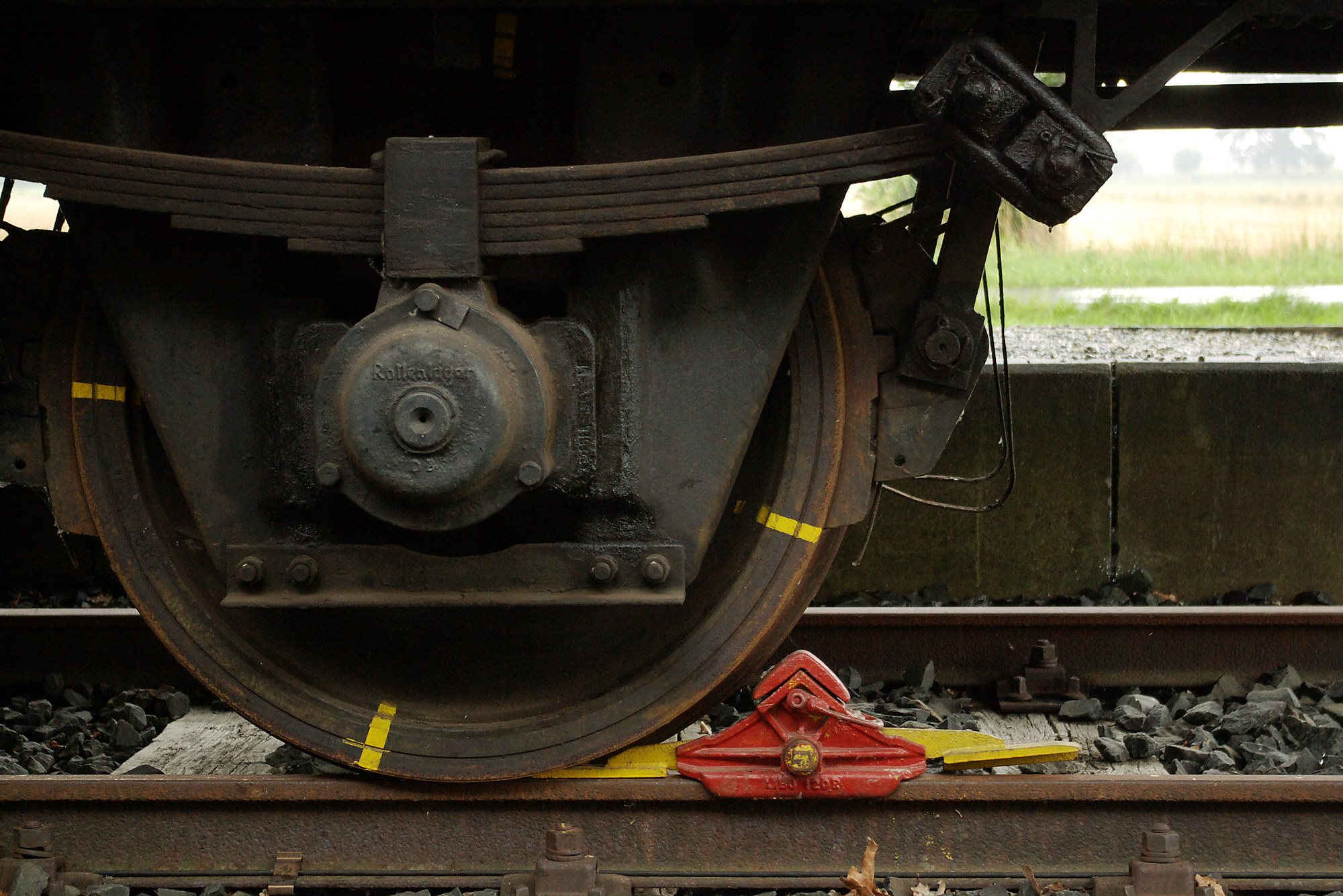 Radvorleger zur Sicherung abgestellter Wagen DB